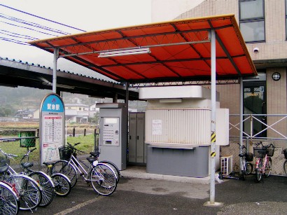 2005年3月28日に投稿者が賀来駅にて撮影。